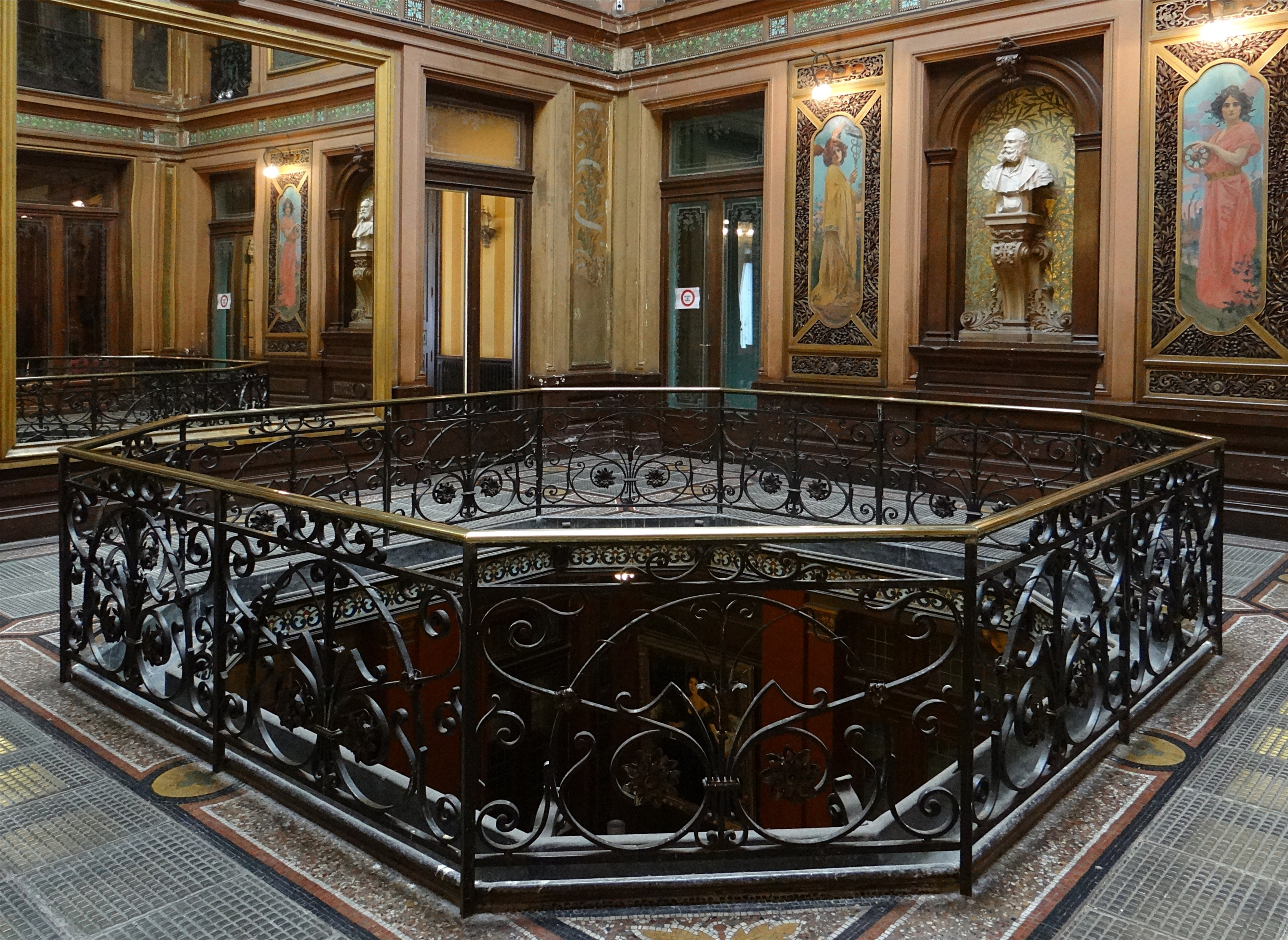 Galerie de l'hôtel Pams, Perpignan, Pyrénées-Orientales, France This building is en partie classé, en partie inscrit au titre des Monuments Historiques.